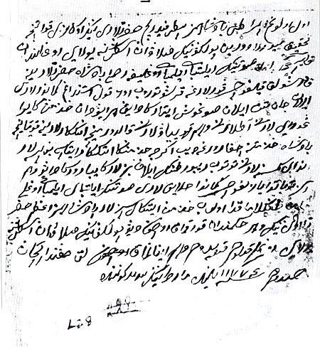 Приказ Салавата Юлаева